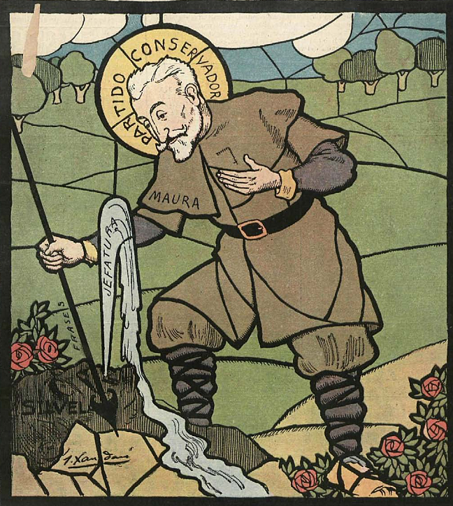 El milagro del santo, en la revista satírica española Gedeón.